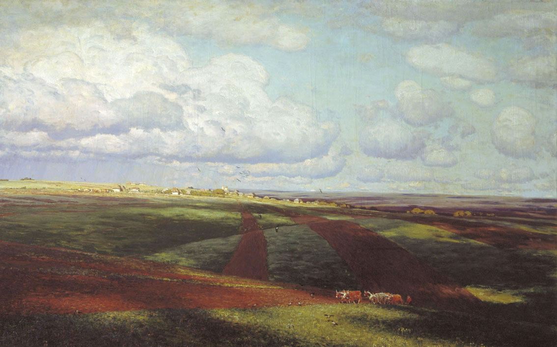 Н. Н. Дубовской. «Родина». 1905. Холст, масло. 165 × 275. Омский областной музей изобразительных искусств имени М. А. Врубеля, Омск.